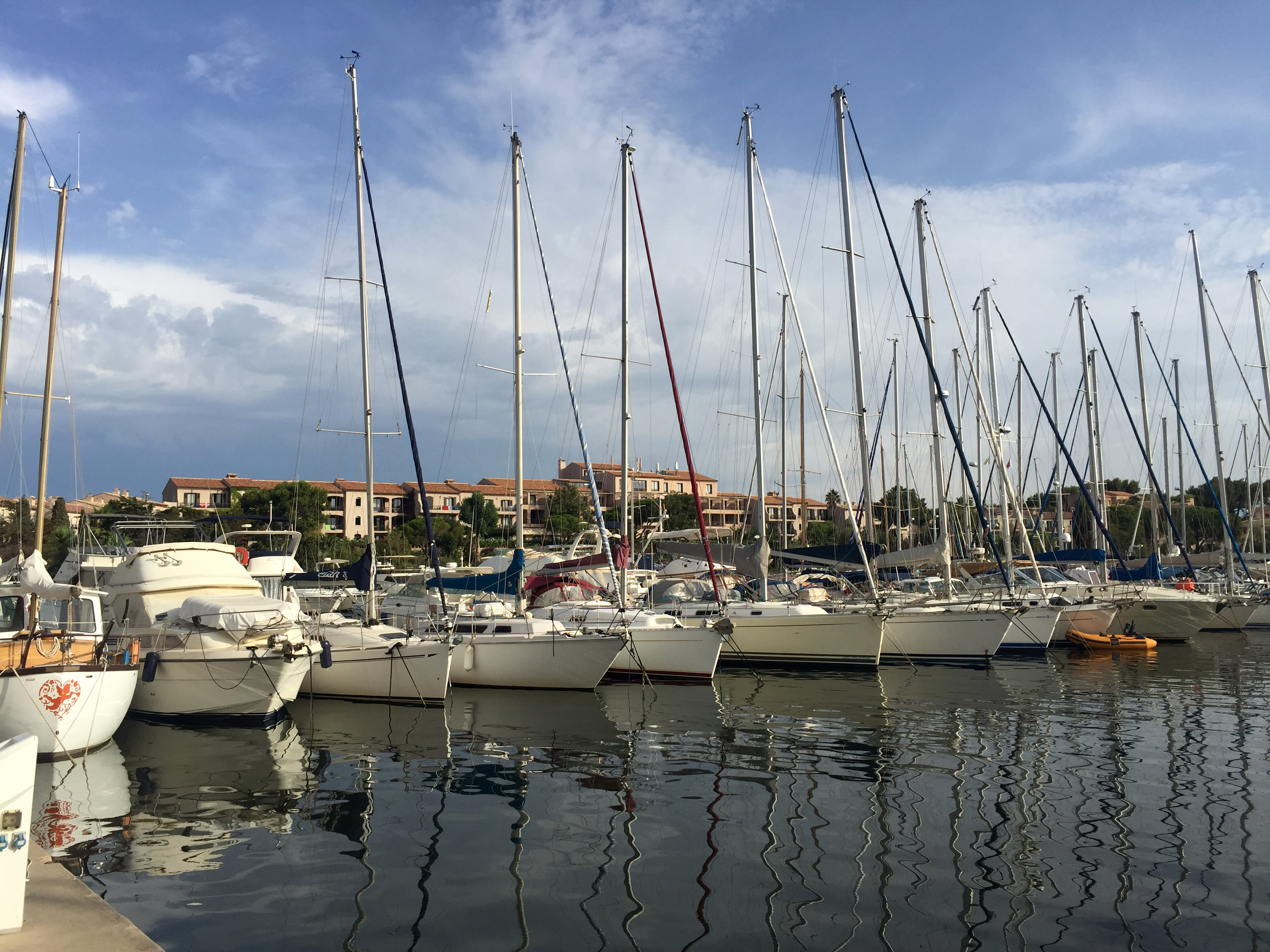 Navires dans le port de l'île des Embiez.